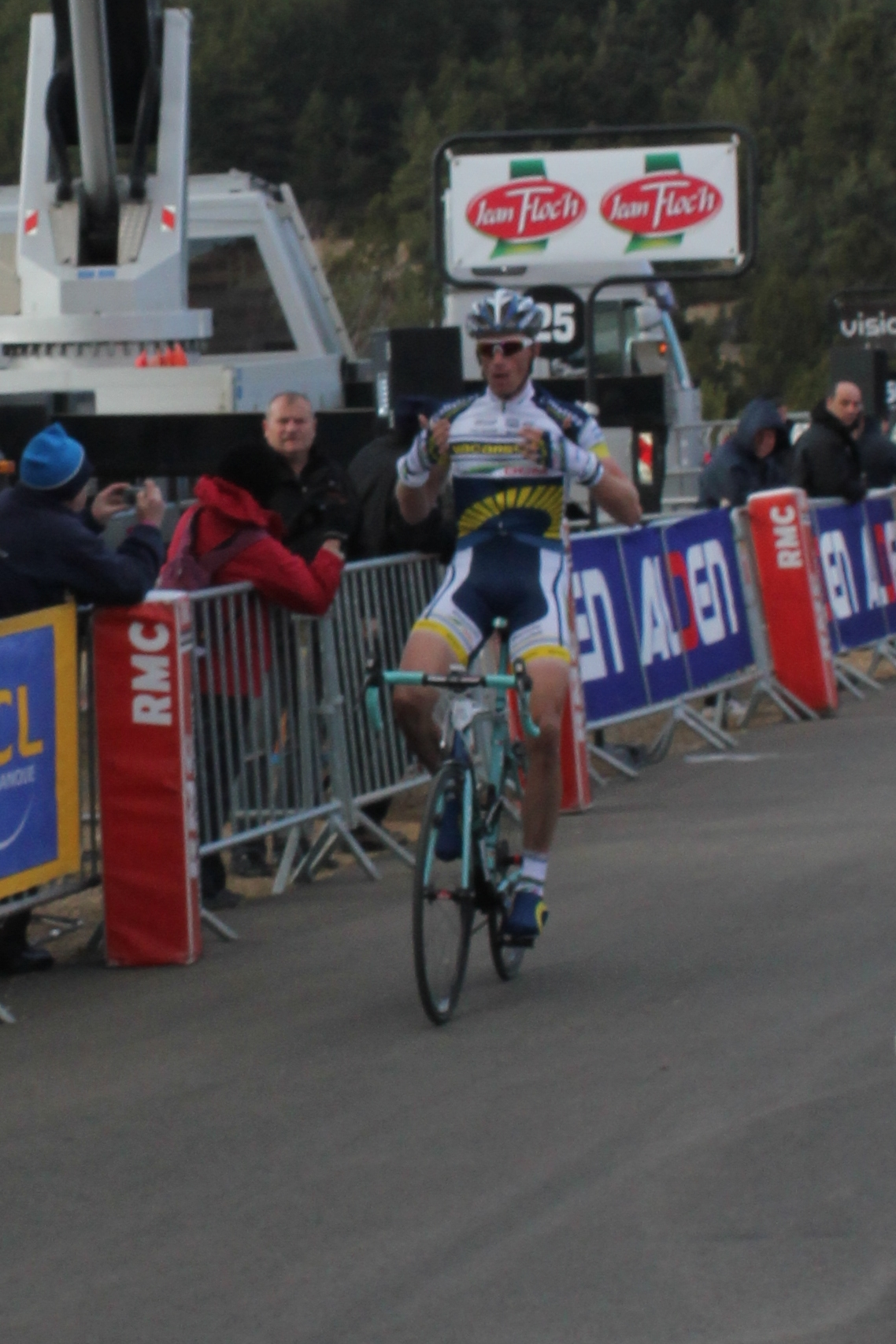 Arrivée de Lieuwe Westra en haut de la croix neuve (montée Jalabert) à Mende lors de la 5e étape du Paris-Nice 2012